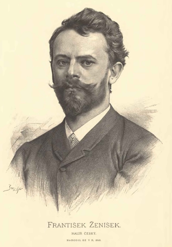 Portréty českých osobností od Jana Vilímka